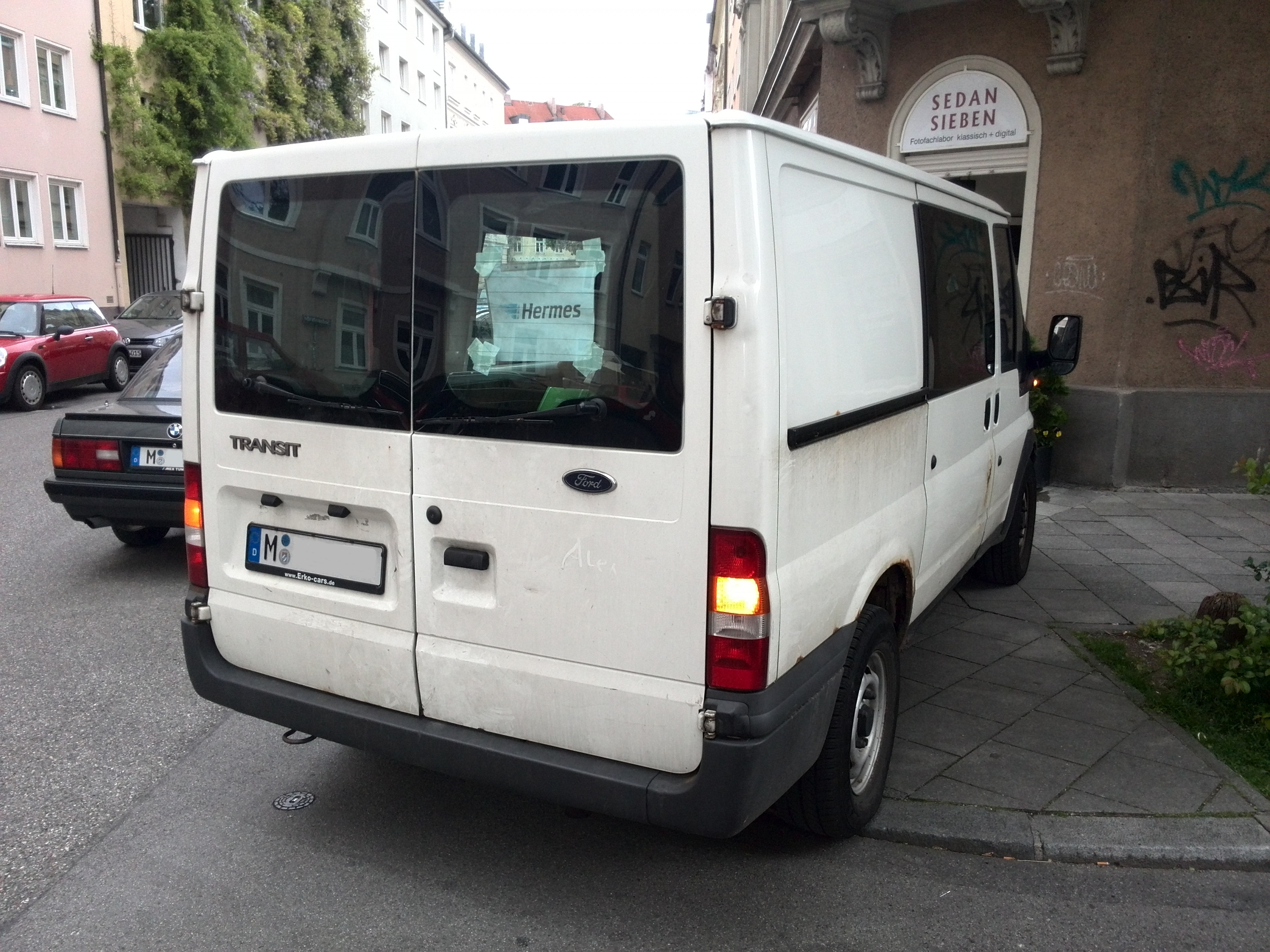 Lieferwagen Subunternehmer Hermes Logistik Gruppe